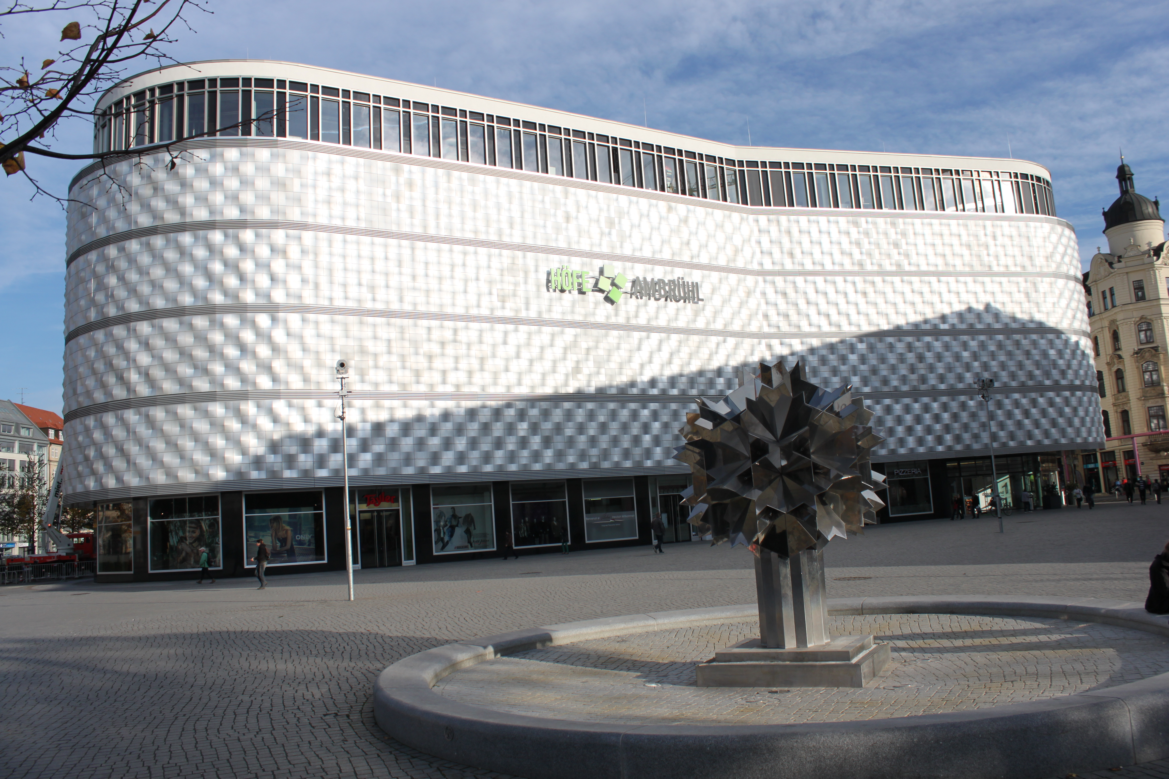 Brühl in Leipzig